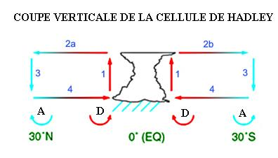 Coupe verticale de la cellule climatique de Hadley entre l'équateur et 30 degrés N et S. L'air chaud et humide converge à l'équateur parce que le facteur de Coriolis y est négligeable et que les vents n'y ont pas de direction privilégiée. L'air se déplace alors vers les zones de pression plus basses (4) où ils s'élèvent en formant des orages (1). C'est la zone dite de convergence intertropicale où les précipitations sont très abondantes mais les vents faibles (le pot-au-noir). Quand les parcelles d'air chaud et humide atteignent la tropopause (limite entre la troposphère et la stratosphère), à environ 12 à 15 km d'altitude, elles ne peuvent monter plus haut ni ne peuvent rester à cet endroit à cause du flux constant venant des basses couches de l'atmosphère. Par conséquent, elles sont repoussées vers le nord (2a) ou le sud (2b) de l'équateur. En s'éloignant de l'équateur, la force de Coriolis augmente ce qui dévie les parcelles vers l'Est (du point de vue d'un observateur terrestre). En se déplaçant vers les Pôles, l'air se refroidit par échange avec l'environnement ce qui éventuellement le rend négativement instable et il commence à descendre (3). Lors de la descente, les parcelles d'air suivent la courbe de gradient thermique adiabatique sèche, ce qui fait qu'elles se réchauffent et que leur humidité relative tombe. Cela se produit autour de 30 à 35 degrés N et S où l'on retrouve la zone de calme subtropical aride dominée par un anticyclone.